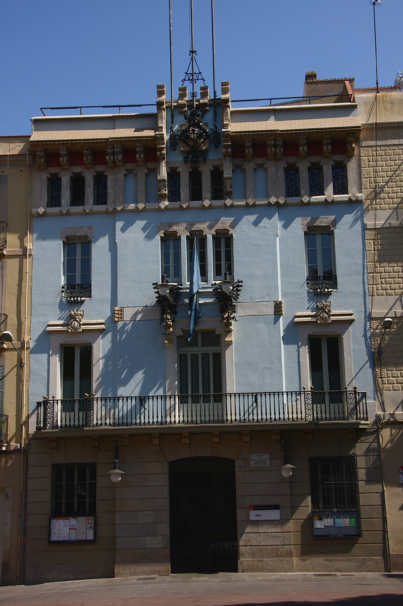 Casa de la Vila de Gràcia, obra modernista de Francesc Berenguer i Mestres Construïda en 1905.